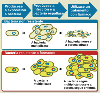 Modo en que se espallan as bacterias resistentes a antibióticos